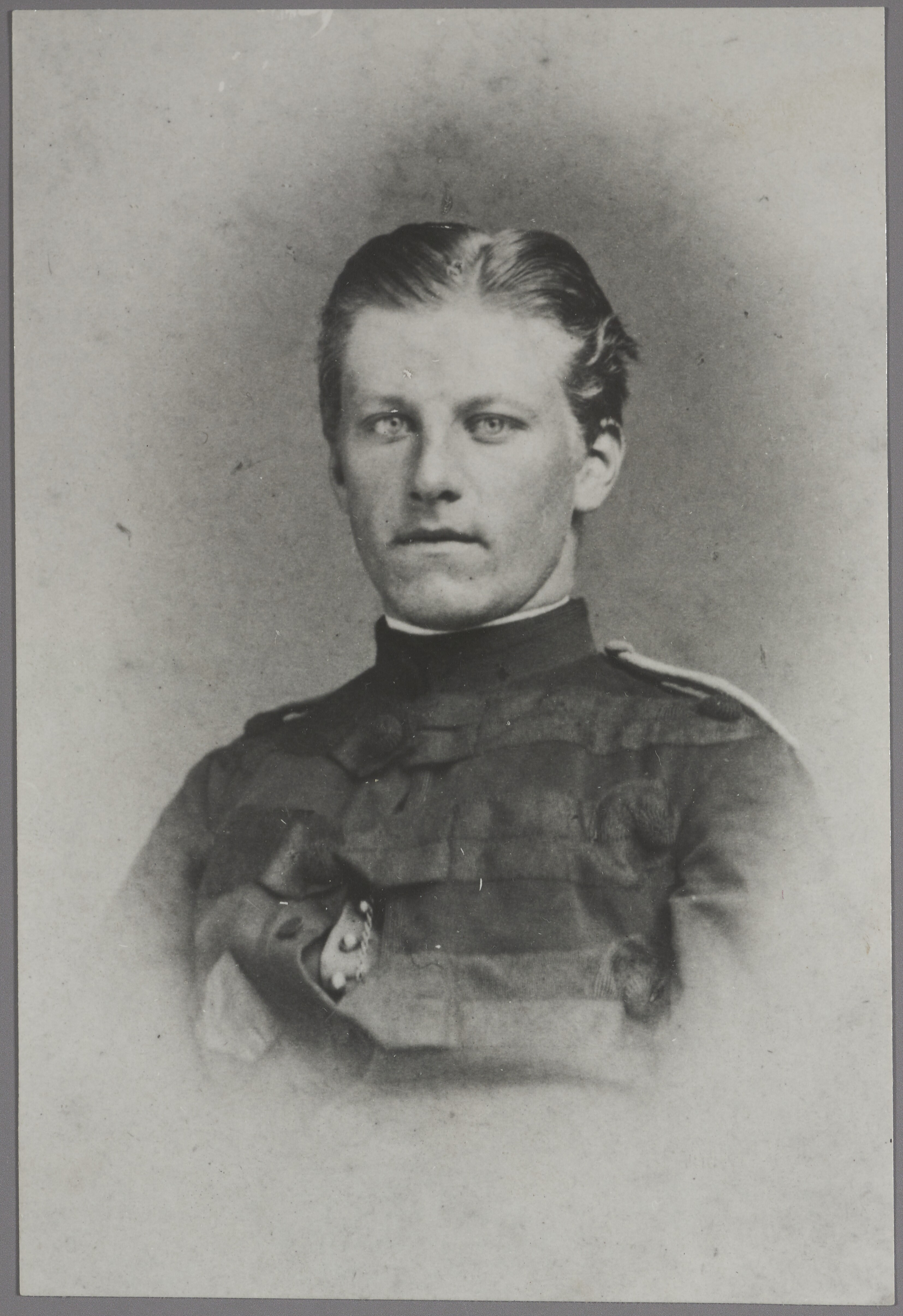 Wilhelm Dinesen (1845-1895), dansk forfatter og officer